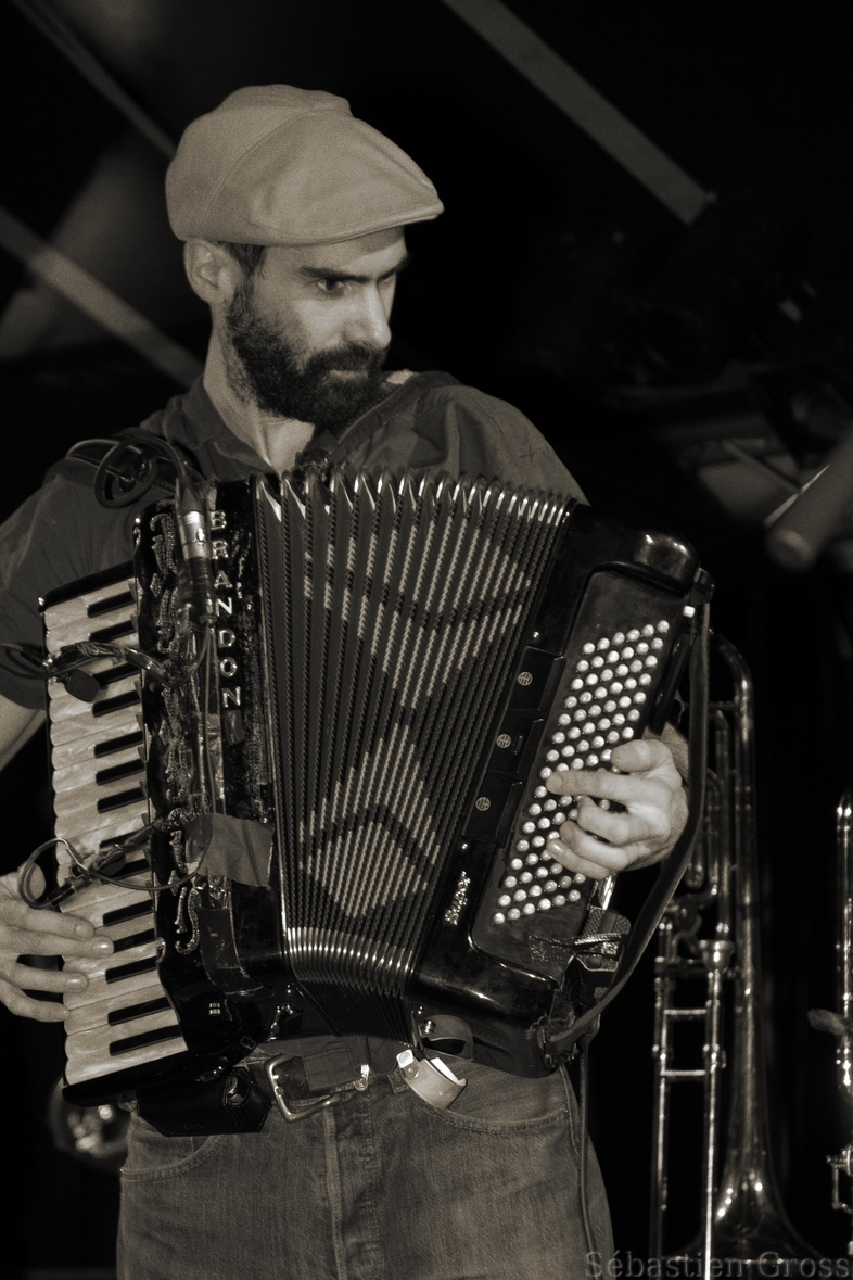 Fredo Burguière (Les Ogres De Barback) (Aux Urnes Etc.. Cergy 2007)